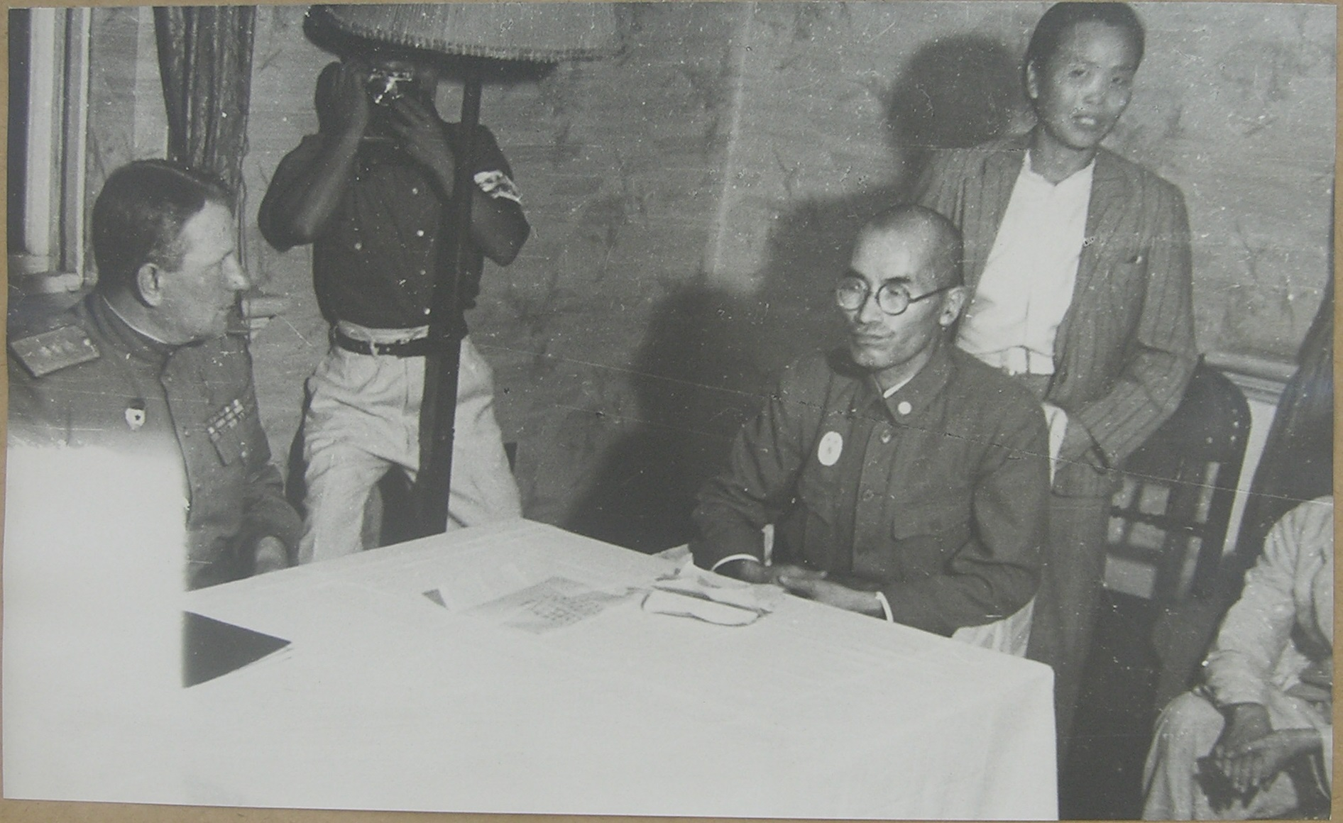 정권 이관의 광경: 1945년 8월 26일 밤 철도 호텔에서 ( 8•15해방일주년기념 북조선 민주주의 건설 사진첩) : 왼편의 소련 제25군 사령관 이반 치스차코프(Ivan Chistyakov) 대장이 오른 편의 후루카와 가네히데(古川兼秀) 평안남도지사로부터 행정권 이양을 받는 모습. 참고: 이반 치스차코프(Ivan Chistyakov) 대장이 일본군 평양사관구(平壤師管區) 사령관 다케시타 요시하루(竹下義晴) 중장으로부터 항복을 받는 사진